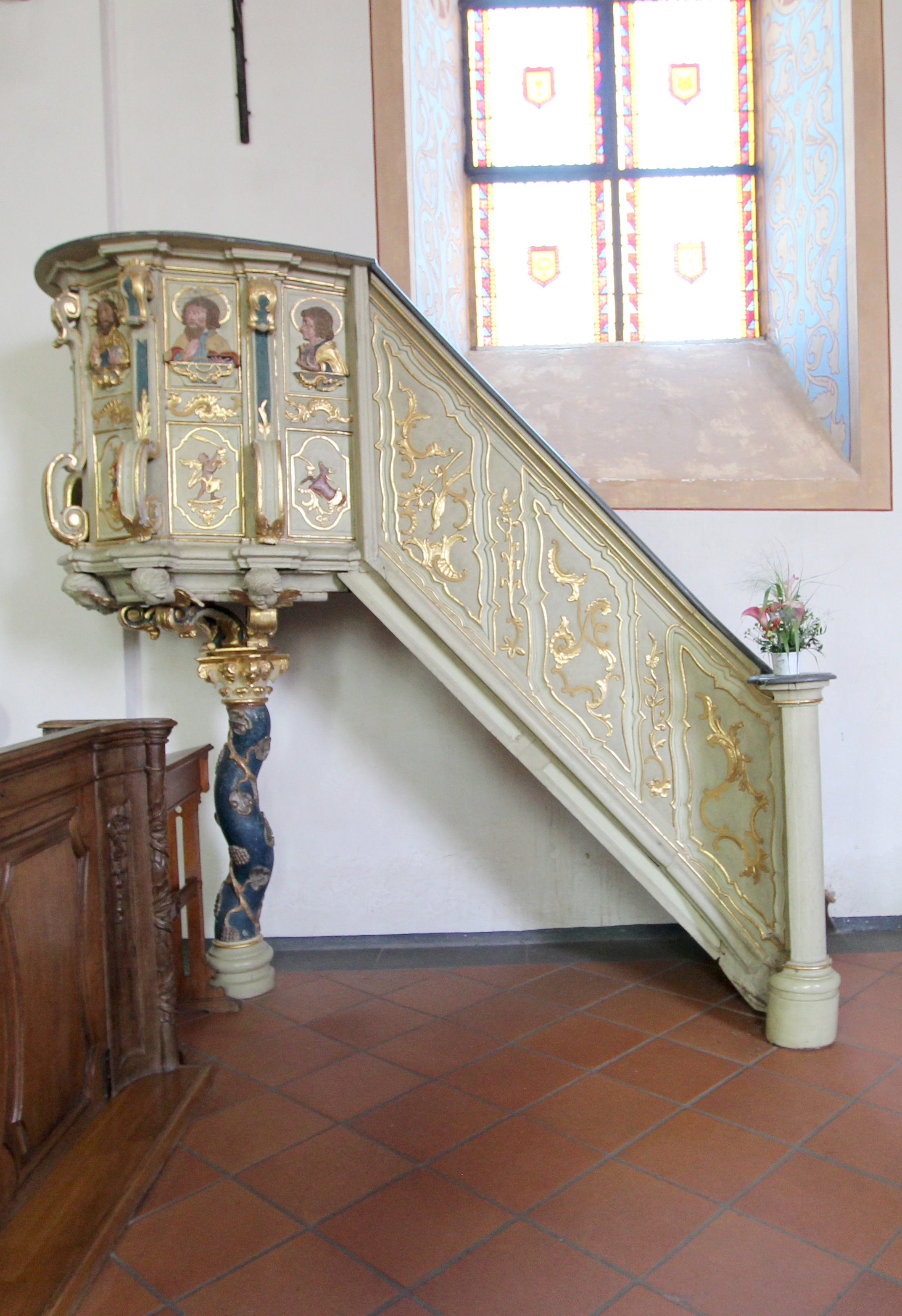 54570 Rockeskyll, Dorfstraße 41. Romanischer Westturm, ursprünglich spätgotischer Einstützenraum von 1511, 1840 erweitert, 1891 über zwei Mittelstützen neu gewölbt. Aufnahme von 2018.